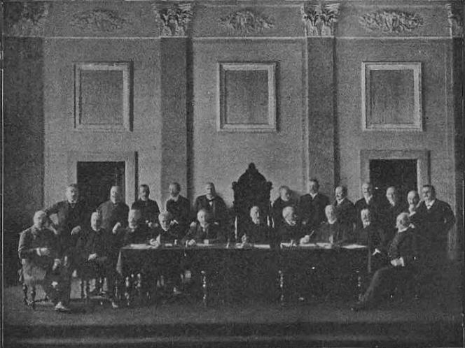 Rada nadzorcza Towarzystwa Wzajemnych Ubezpieczeń w Krakowie w 1911